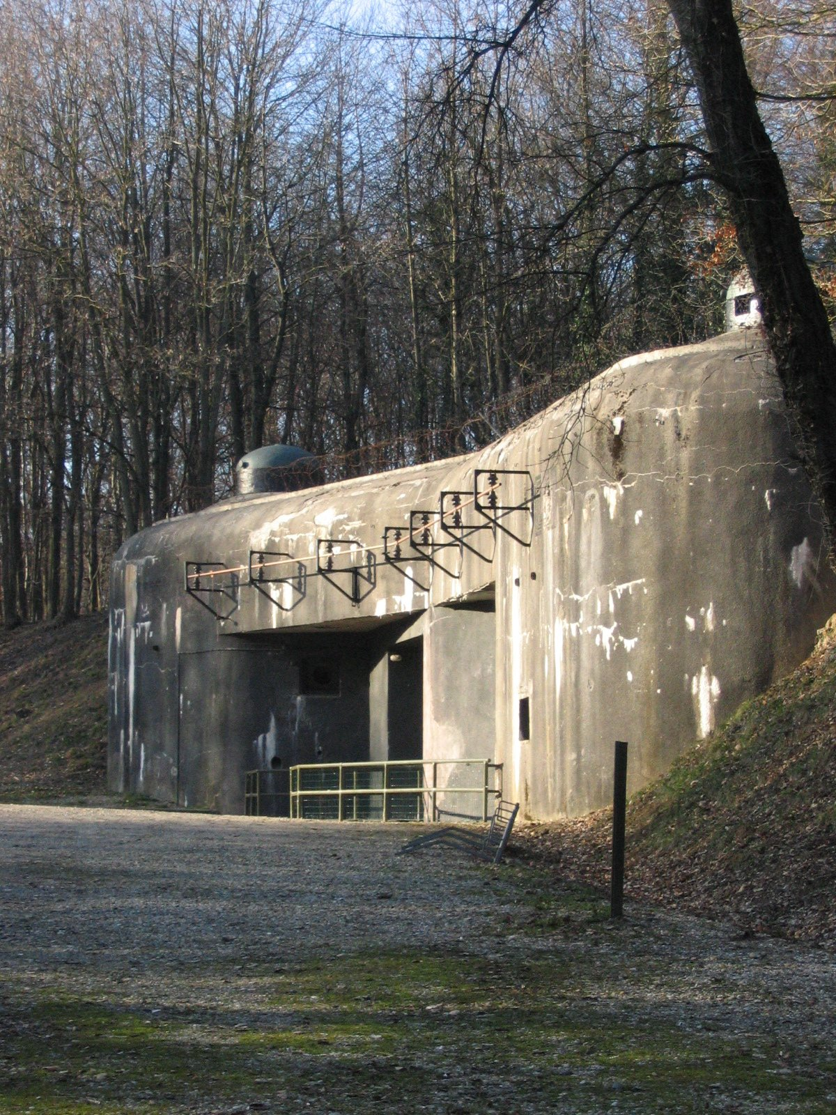 Fort de Schoenenbourg, élément de la ligne Maginot. Entrée des munitions (bloc 7). Photo prise par Denis Helfer sous licence GFDL.